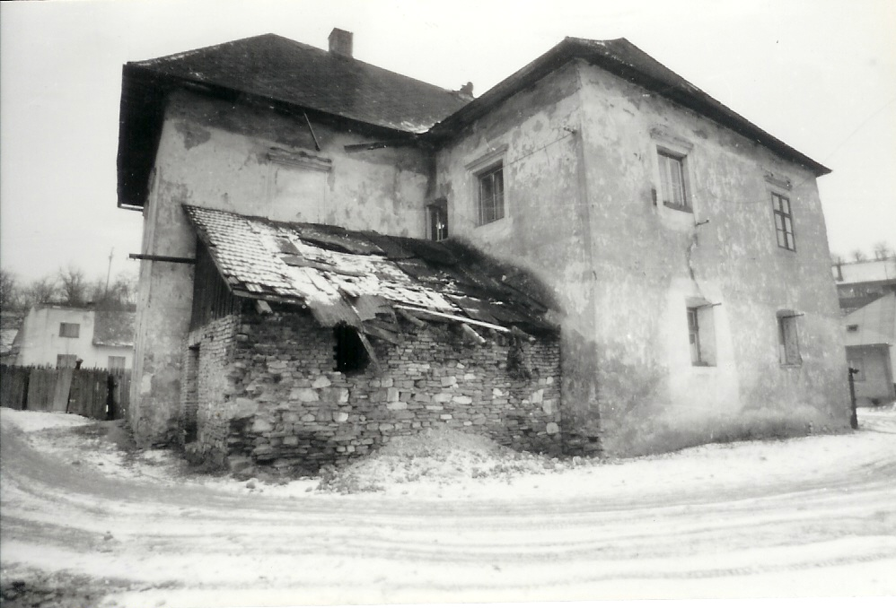 Kaštieľ v Radoli, stav pred rekonštrukciou